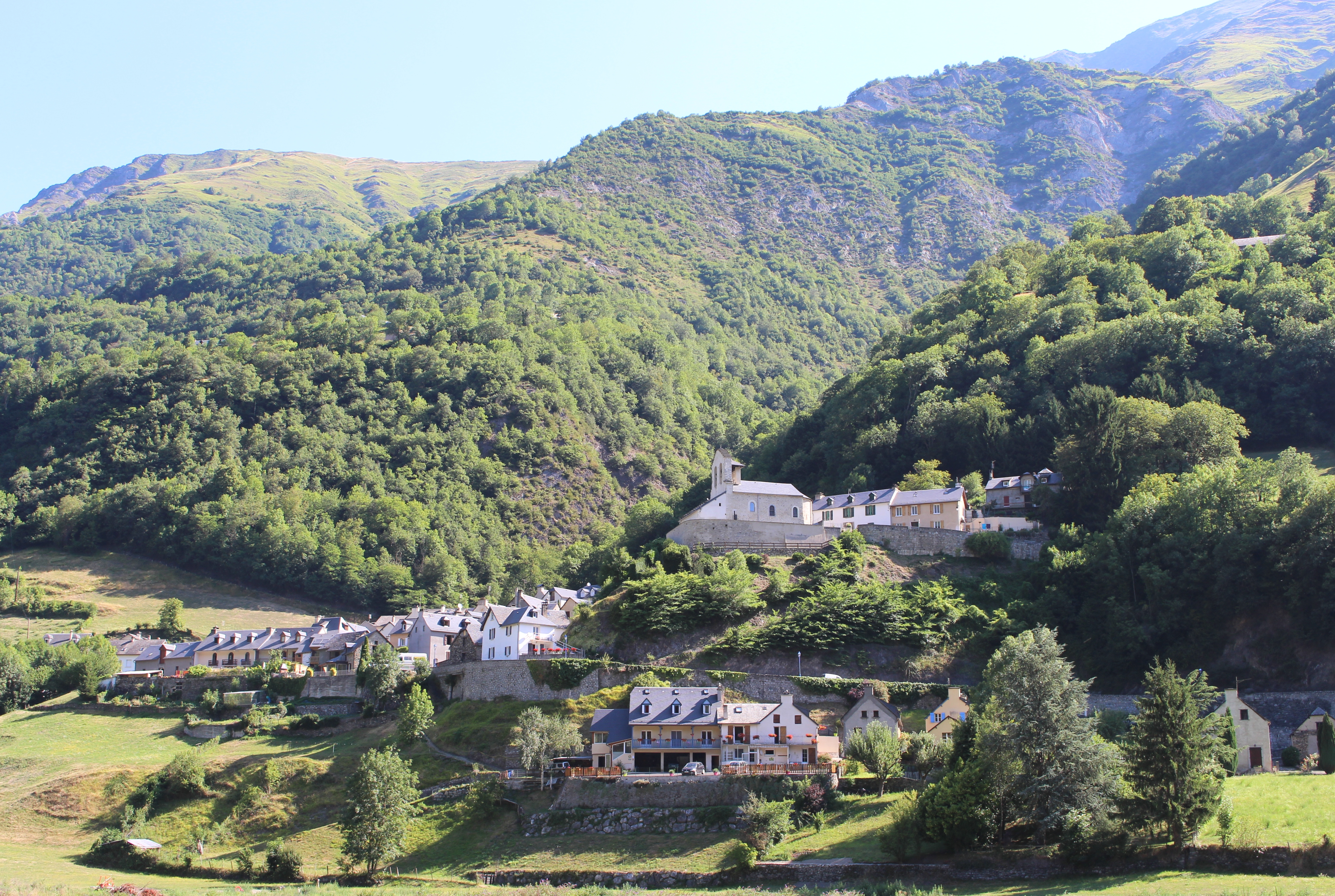 Saligos (Hautes-Pyrénées)